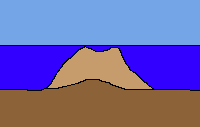 schematische Darstellung eines Plattformriffs